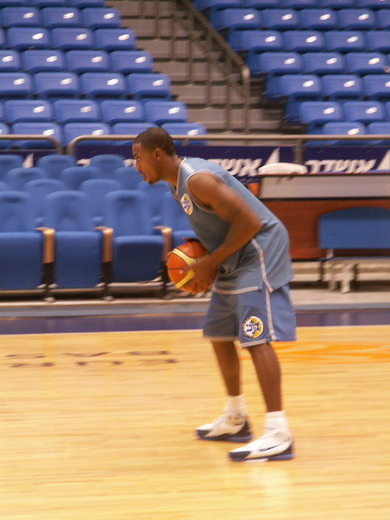 וויל סולומון צולם על-ידי אבי קדמי This picture was taken by Avi Kedmi